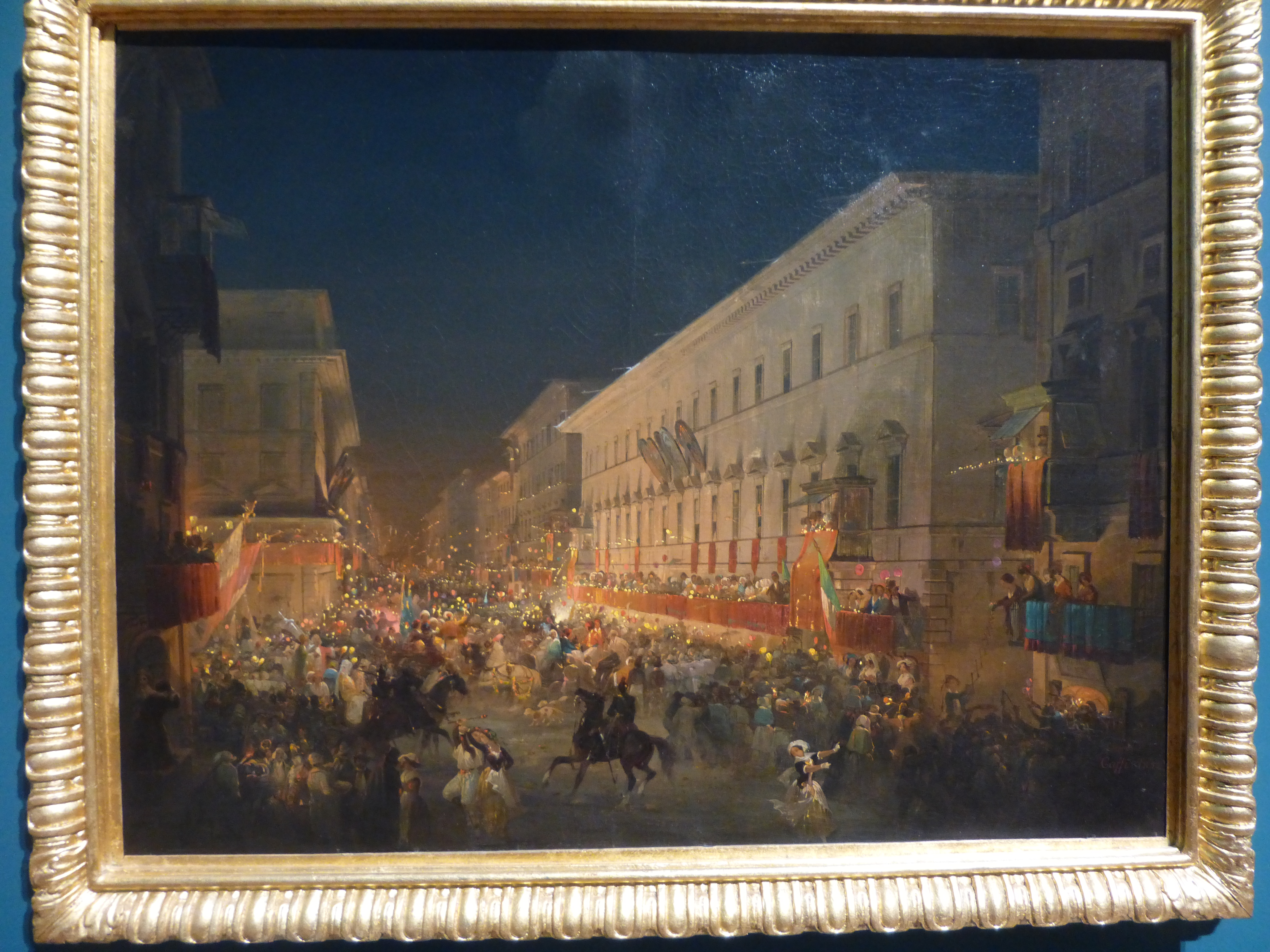 La festa dei moccoletti (Carnevale a Roma).label QS:Lit,"La festa dei moccoletti (Carnevale a Roma)."